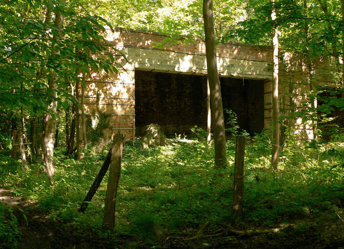 Landschaftsschutzgebiet Buchhorst bei Braunschweig mit dem linken Kugelfang als früherer Hinrichtungsort laut einer Infotafel vor Ort